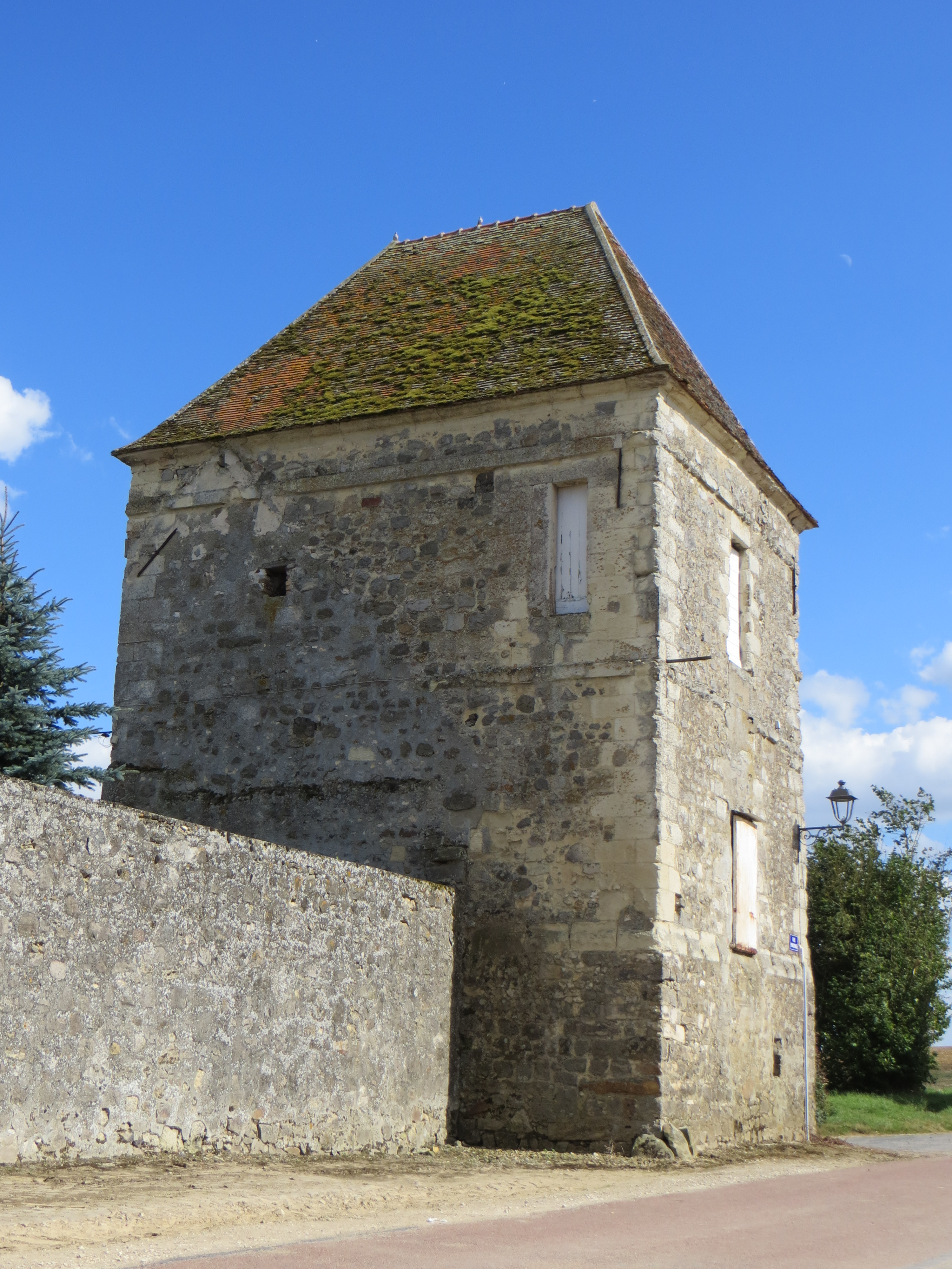 Ferme de Macogny. Vestige du château du XVIIe siècle